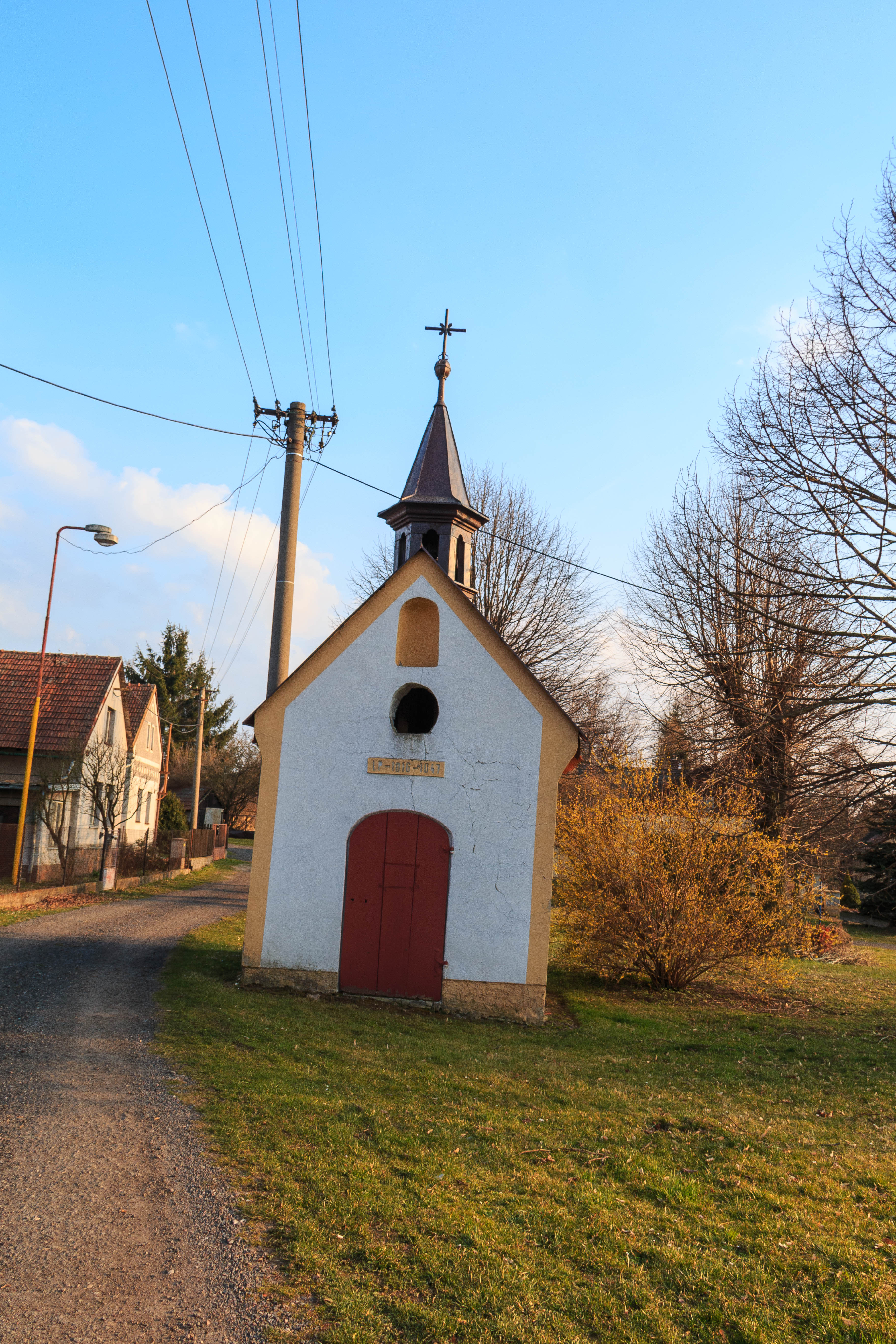 Hlína kaple